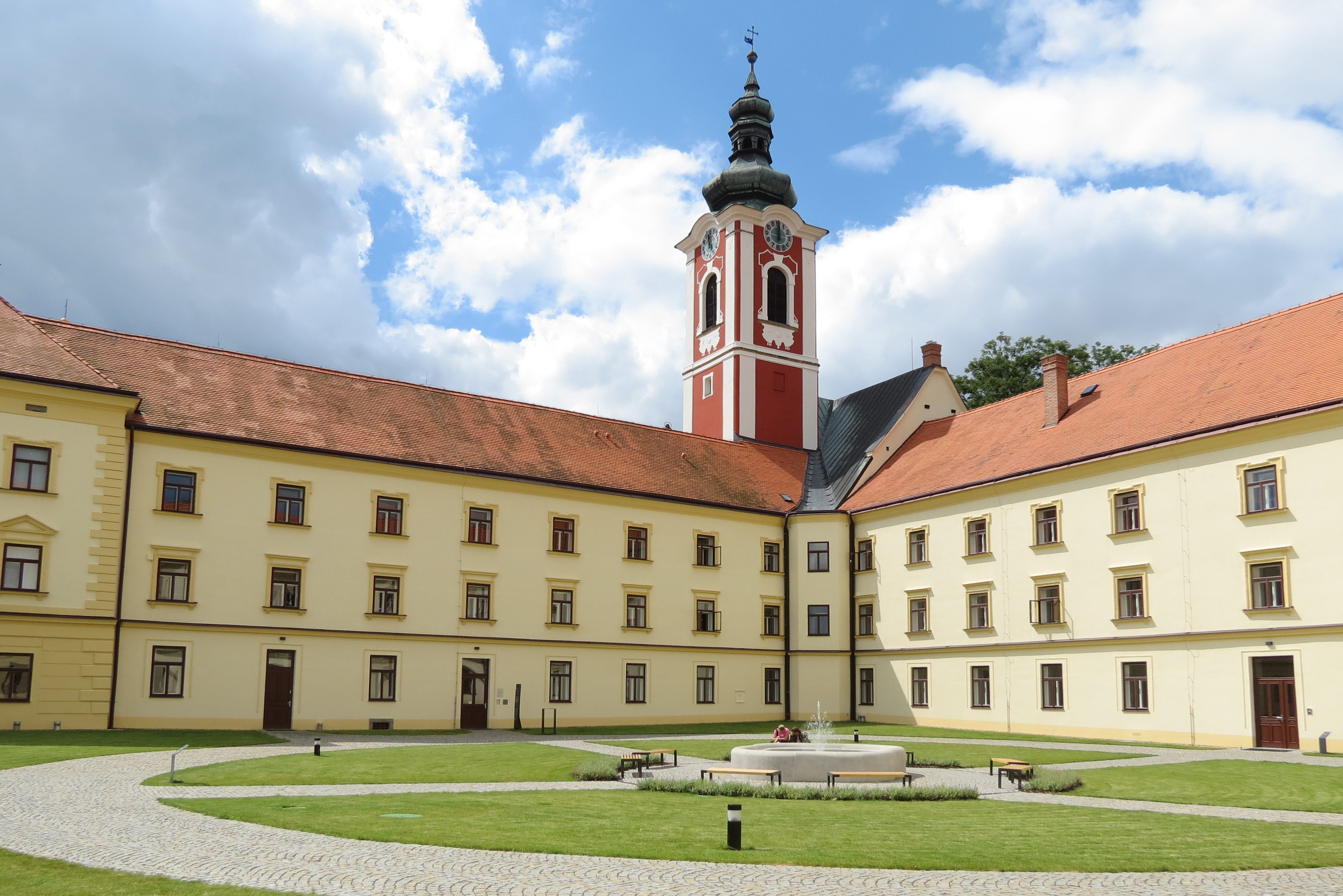 Pacov, barokní zámek, bývalý klášter. Dnes mj. sídlo muzea nebo knihovny. Za střechou vykukuje věž (býv. klášterního) kostela sv. Václava.